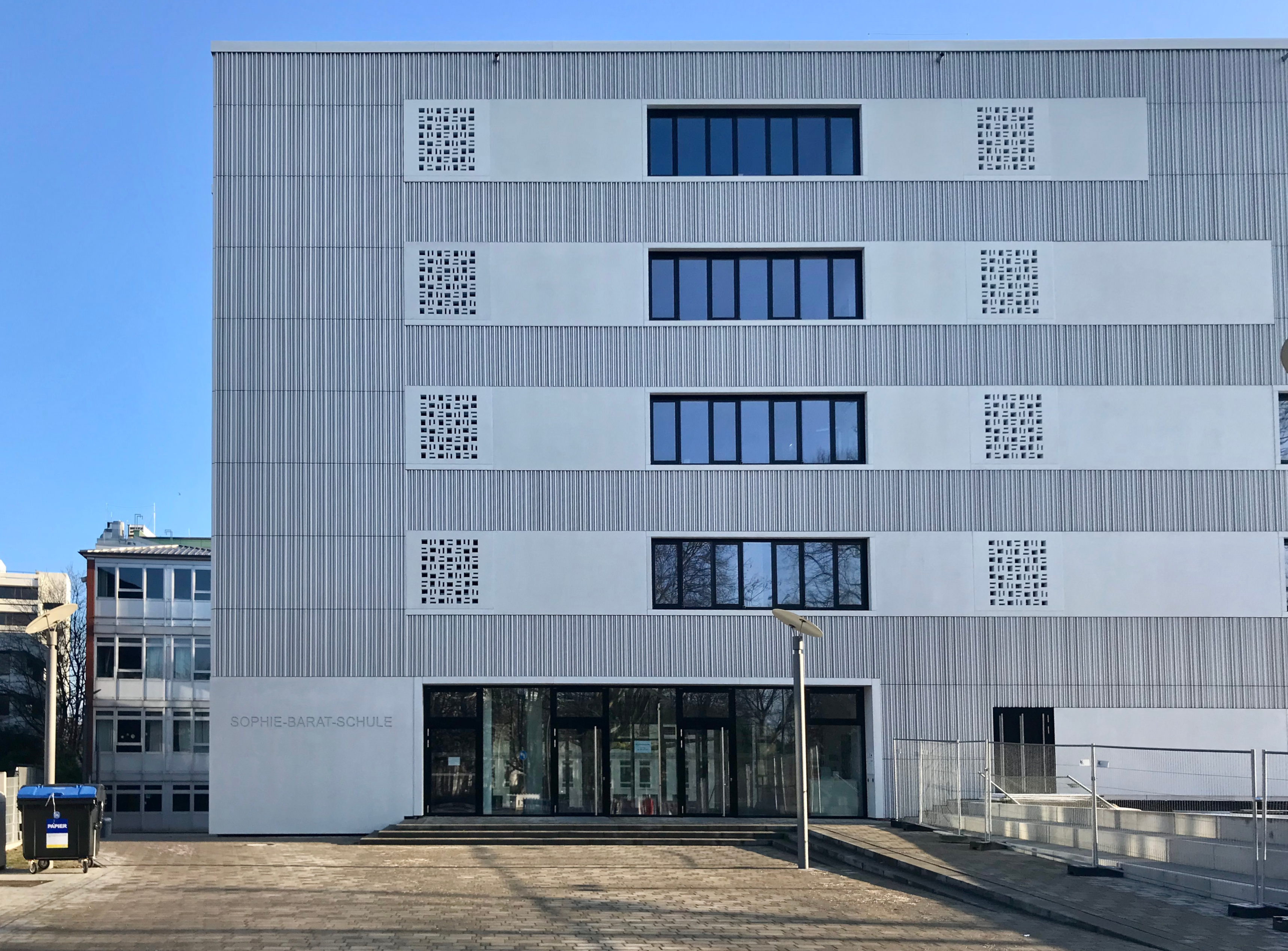 Frontalansicht von der Neuen Rabenstraße